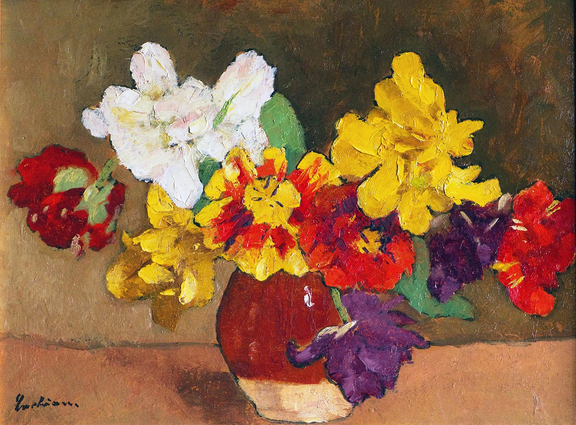 Anemone ulei/carton aflat la Muzeul de Artă din Craiova